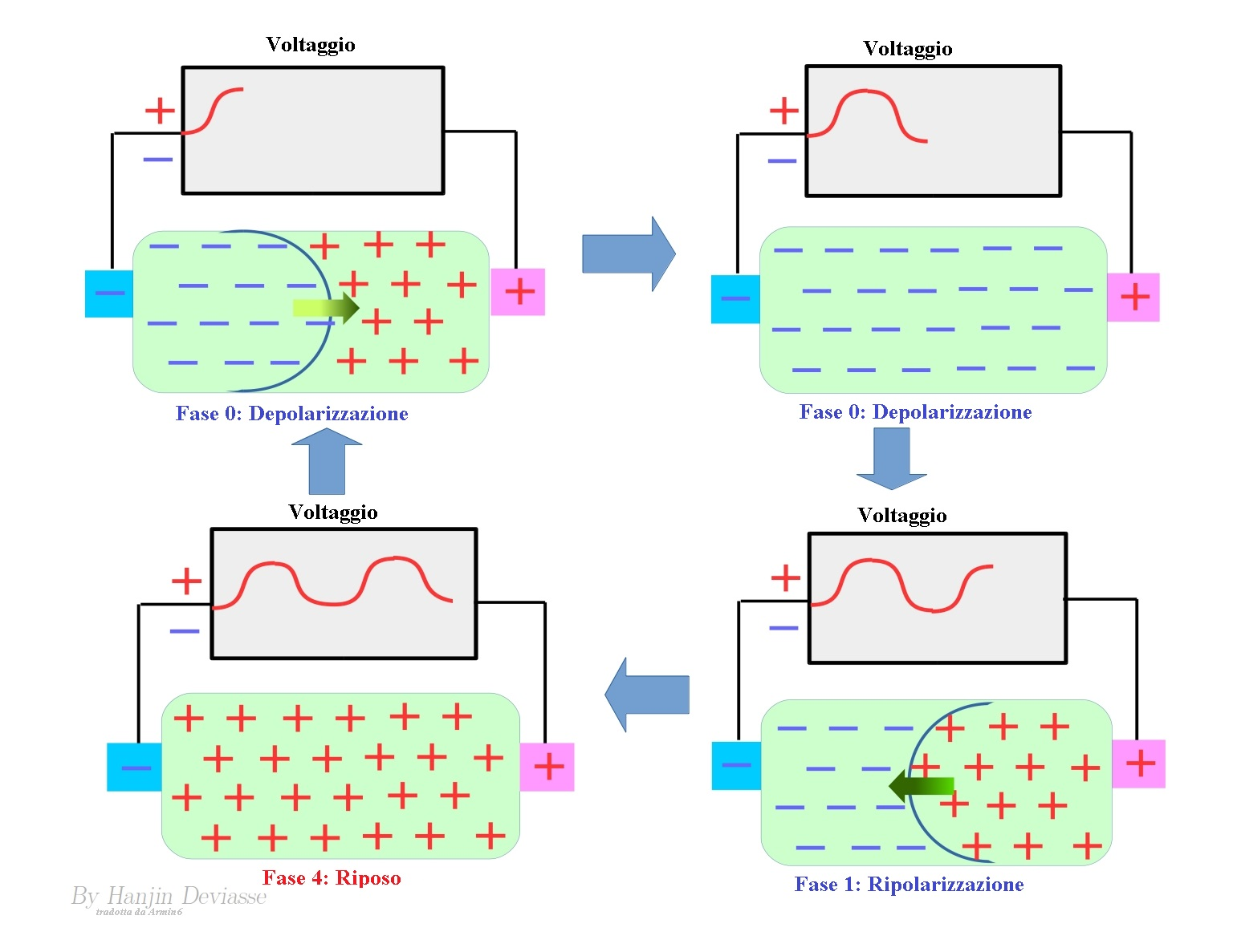 Italian - Elettrocardiogramma